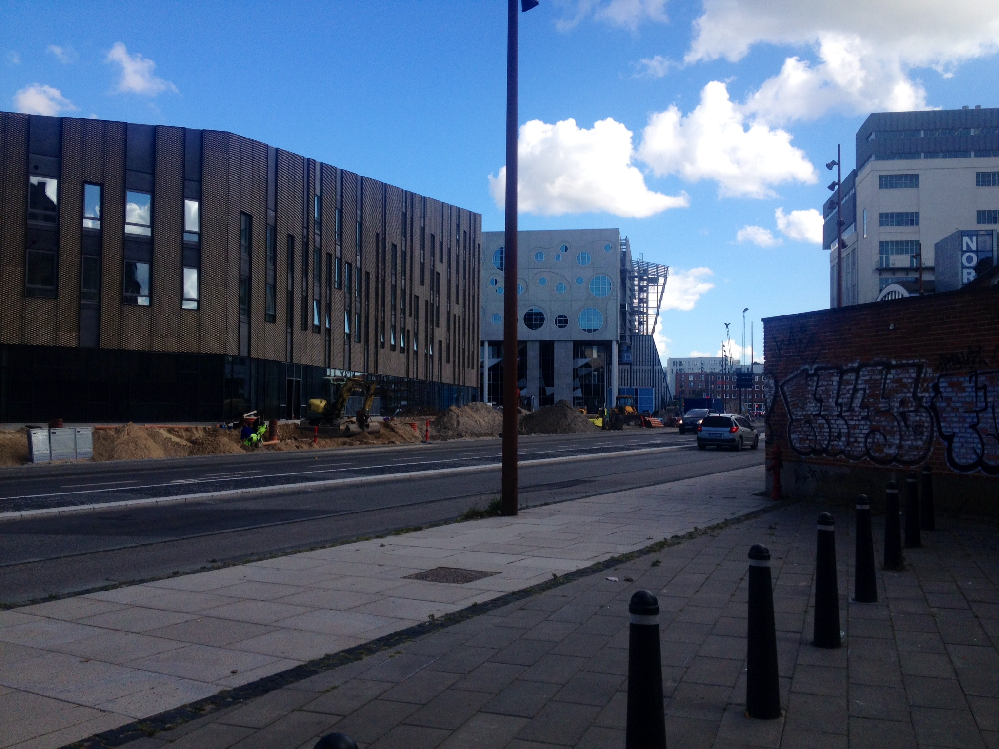 Larsen Waterfront under konstruktion set fra Løkkegade